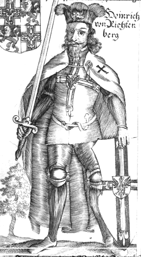 Henryk VII Reffle von Richtenberg